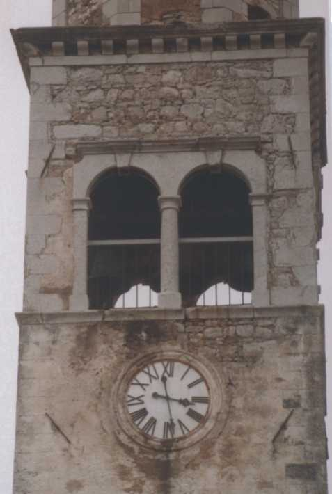 Detail Kirchturm